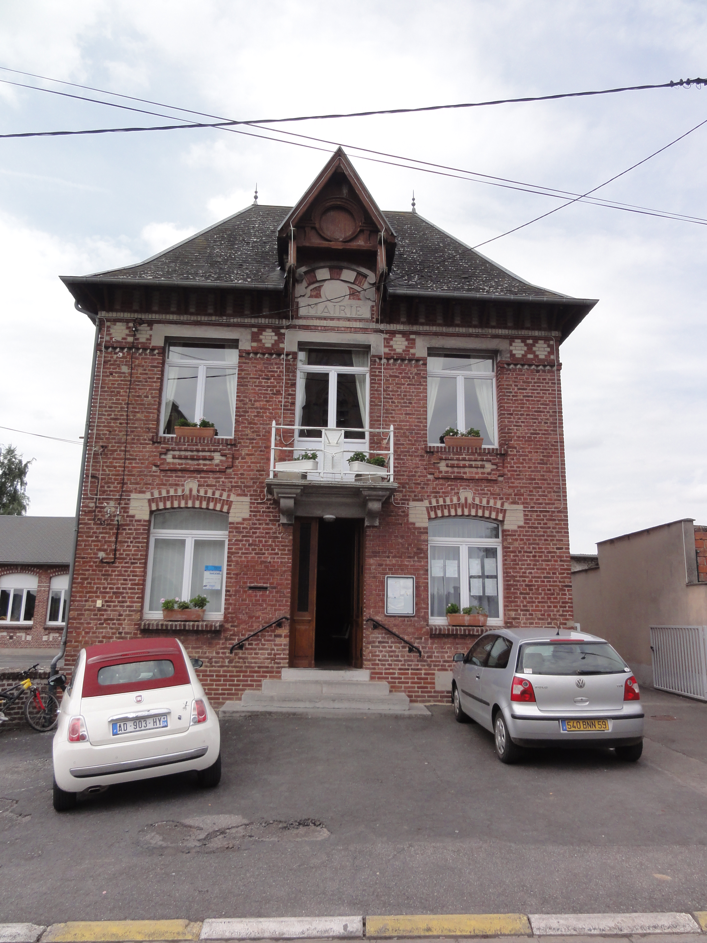 Gouy (Aisne) mairie